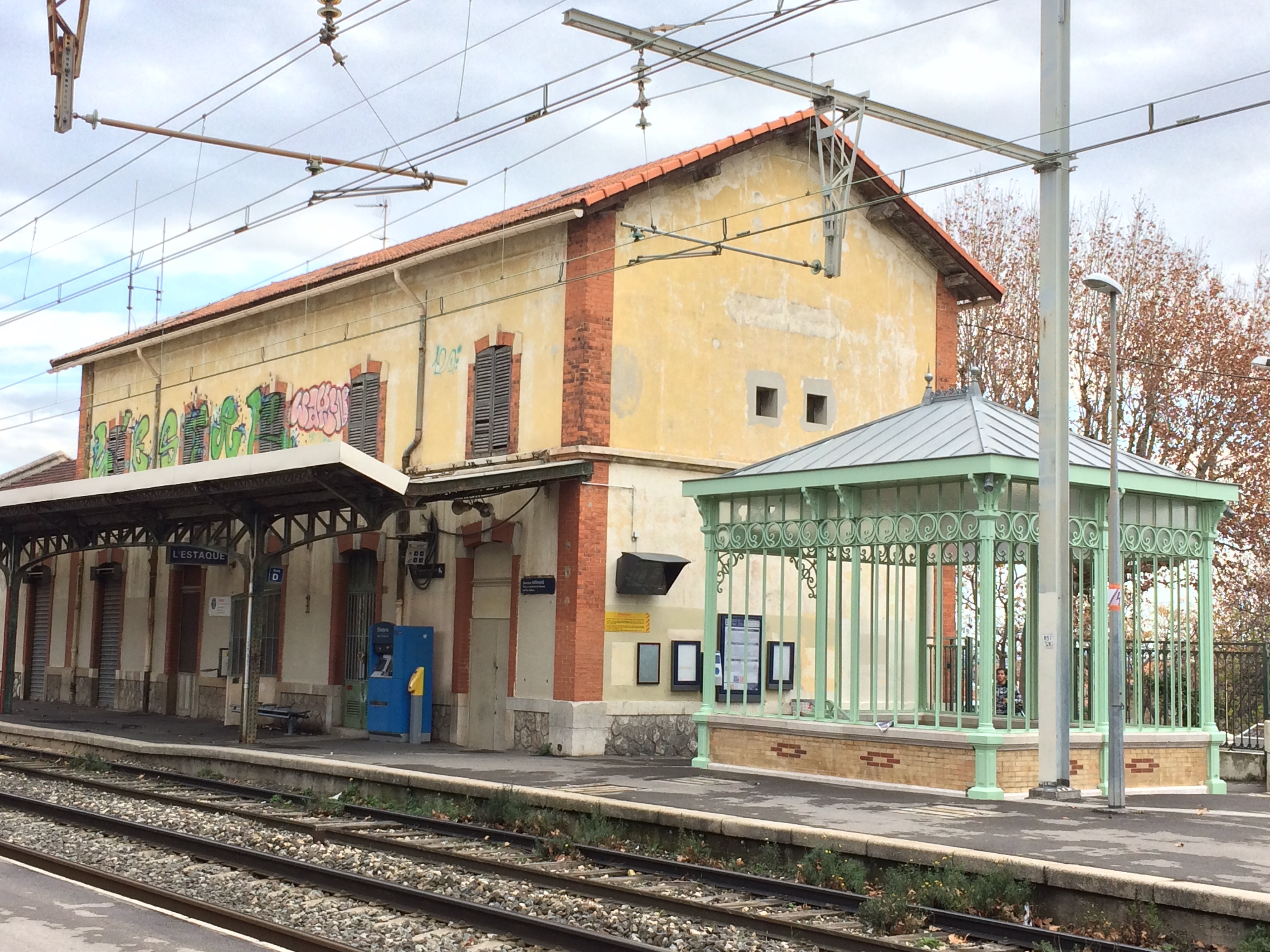 Gare de l'Estaque (Marseille) après rénovation du kiosque